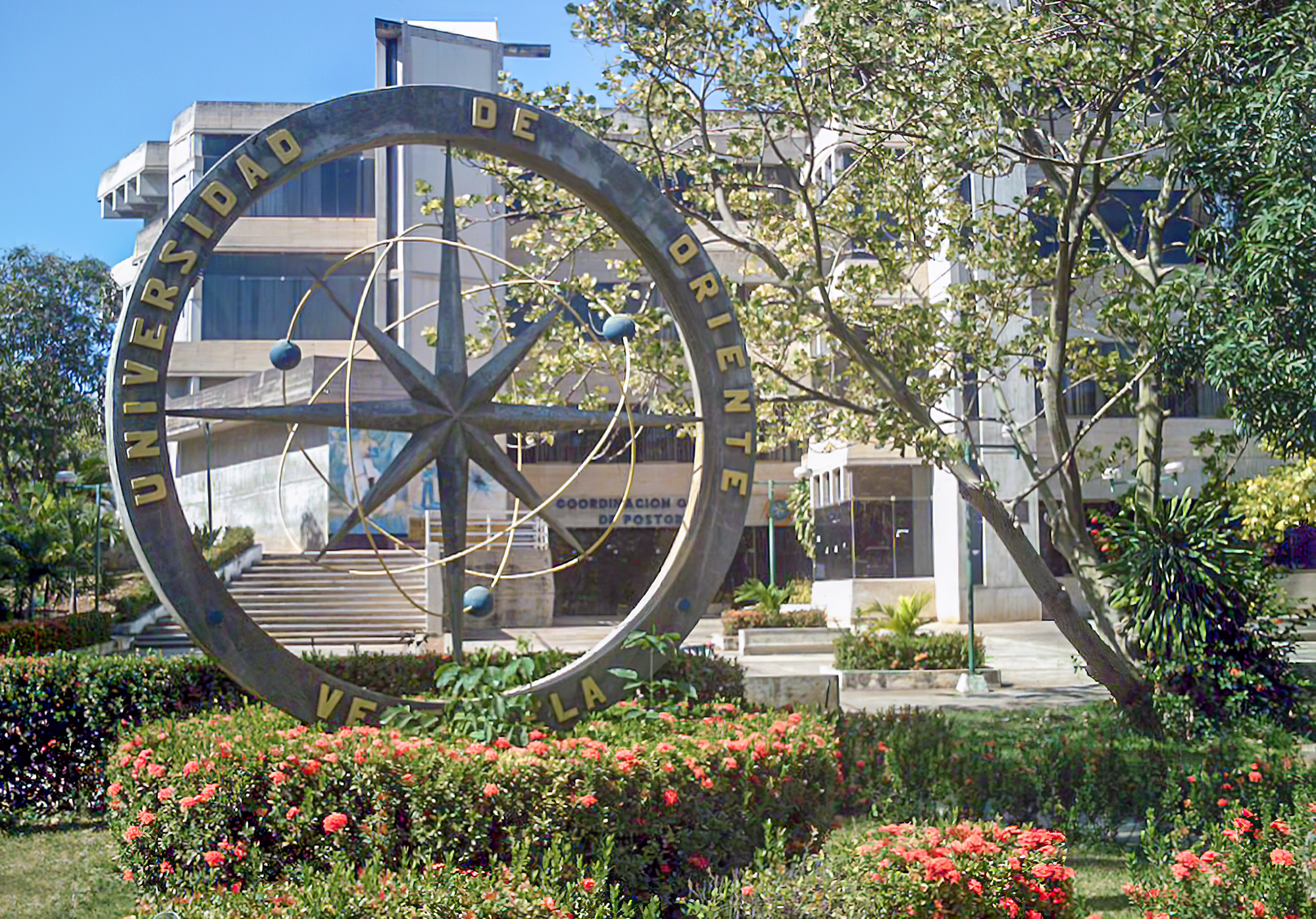 Areas verdes de la UDONE.